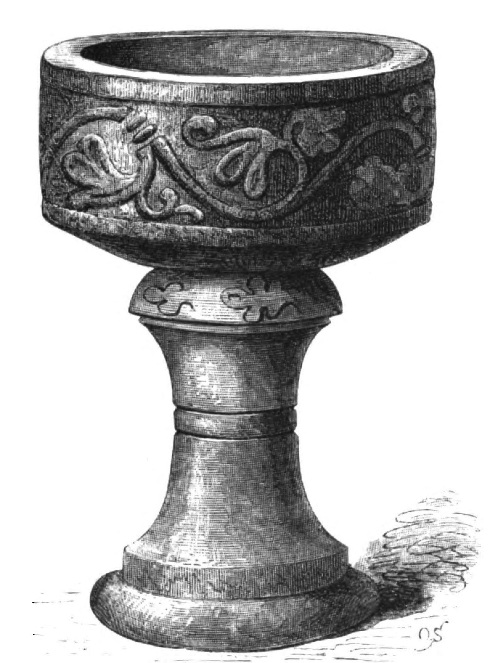 Ucklums kyrka. Dopfunt